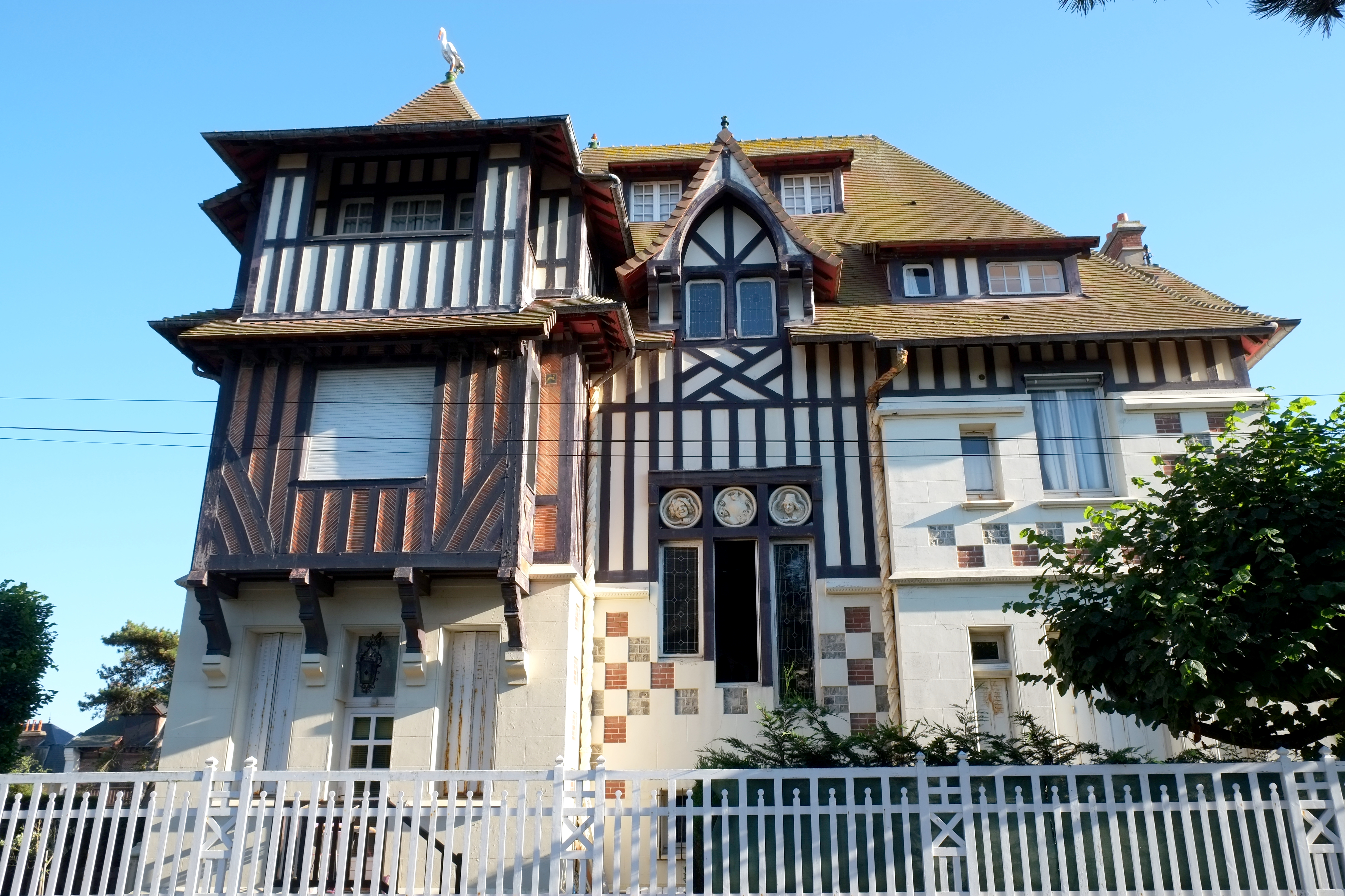 Villa Marie-Antoinette in Cabourg im Département Calvados (Frankreich), Nr. 17 avenue Aristide-Briand